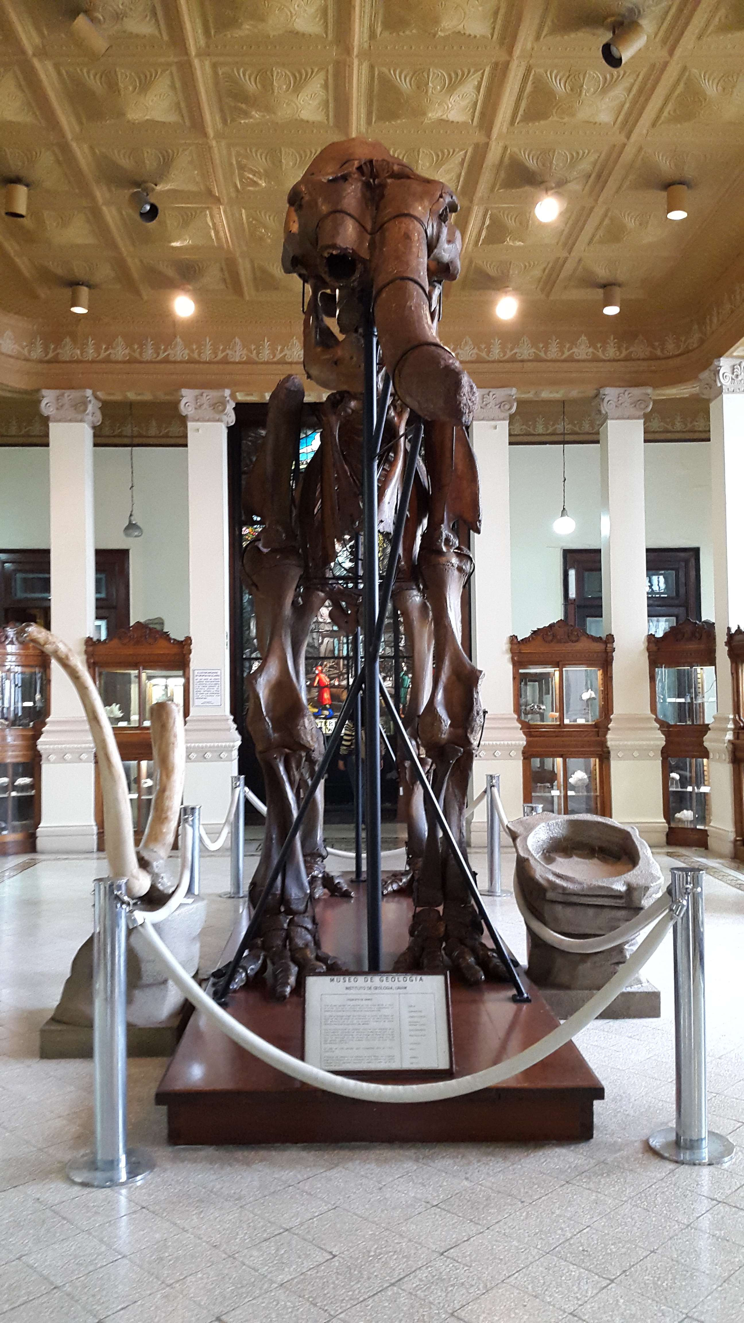 Esqueleto de mamut